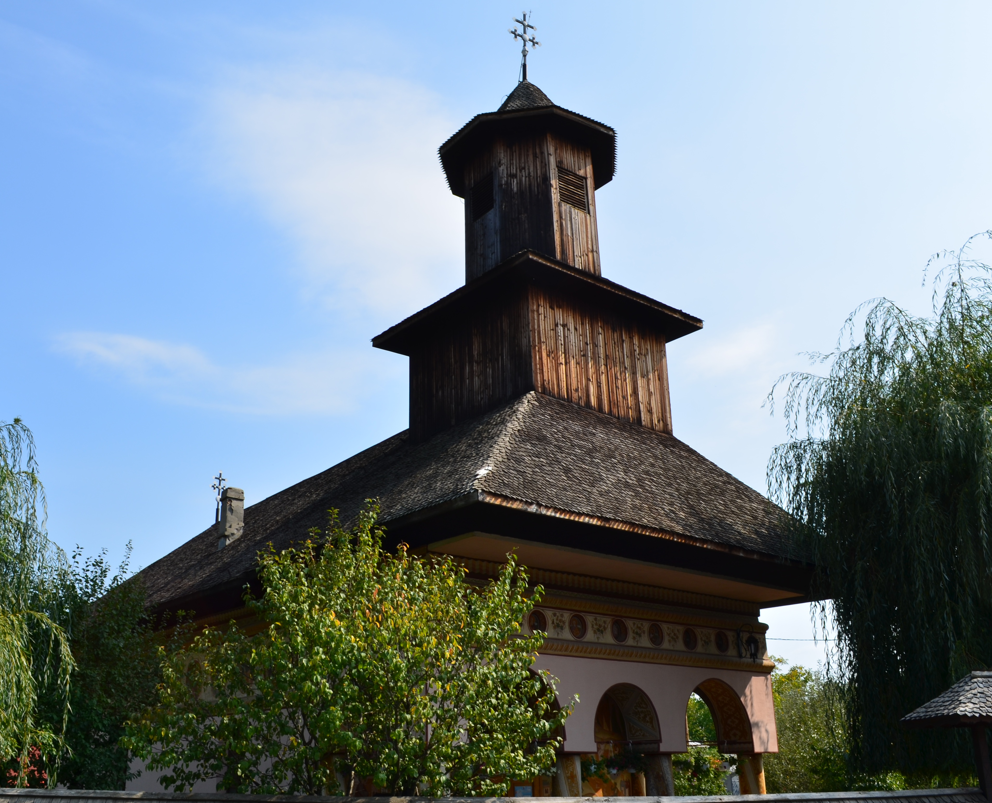 Biserica "Intrarea în Biserică" - Nica Filip, Vălenii de Munte, Prahova. Construită în 1808, având drept ctitori pe Nica Filip (logofăt, d.1831) și Soare Pitoiu